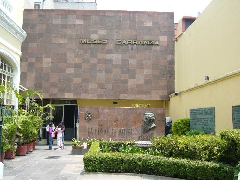 Casa Museo Venustiano Carranza , Mèxico ,Distrito Federal